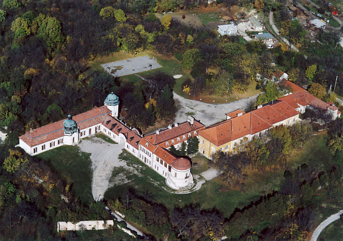 Palace - Iszkaszentgyörgy - Hungary - Europe (Amade-Bajzáth-Pappenheim-Károlyi Mansion)